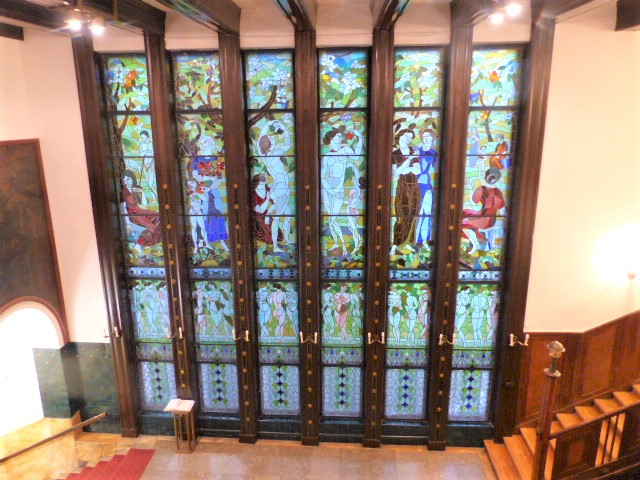 Schiffer ház. Munkácsy Mihály utca 19/b szám, Terézváros, Budapest 2018. szeptember 27-én. A házat Schiffer Miksa építtette 1910 – 1912 között. A tervező Vágó József volt. Az épület hallja 13 x 9,5 m alapterületű, magassága 7,4 m. A hall bal oldalfalát 7 méter szélességben és csaknem teljes magasságban Kernstok Károly ólomüveg ablaka foglalja el. Témája az elveszített "ideális világ".